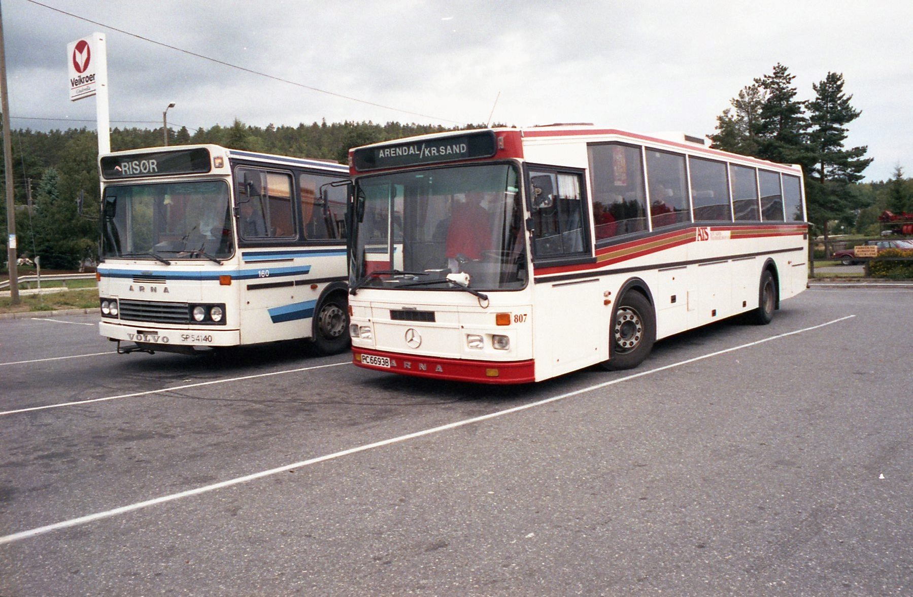 Buss fra Aust-Agder Trafikkselskap (ATS) og Risør og Tvedestrand bilruter (RTB). Parkert ved Cinderella i Gjerstad, 1992.